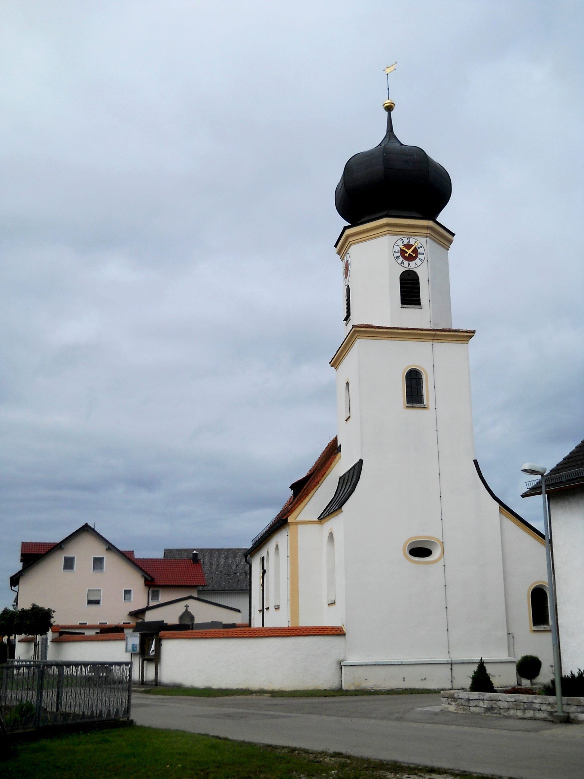 Breitenhill, Gemeindeteil von Altmannstein im oberbayerischen Landkreis Eichstätt, Filialkirche Hl. Kreuz